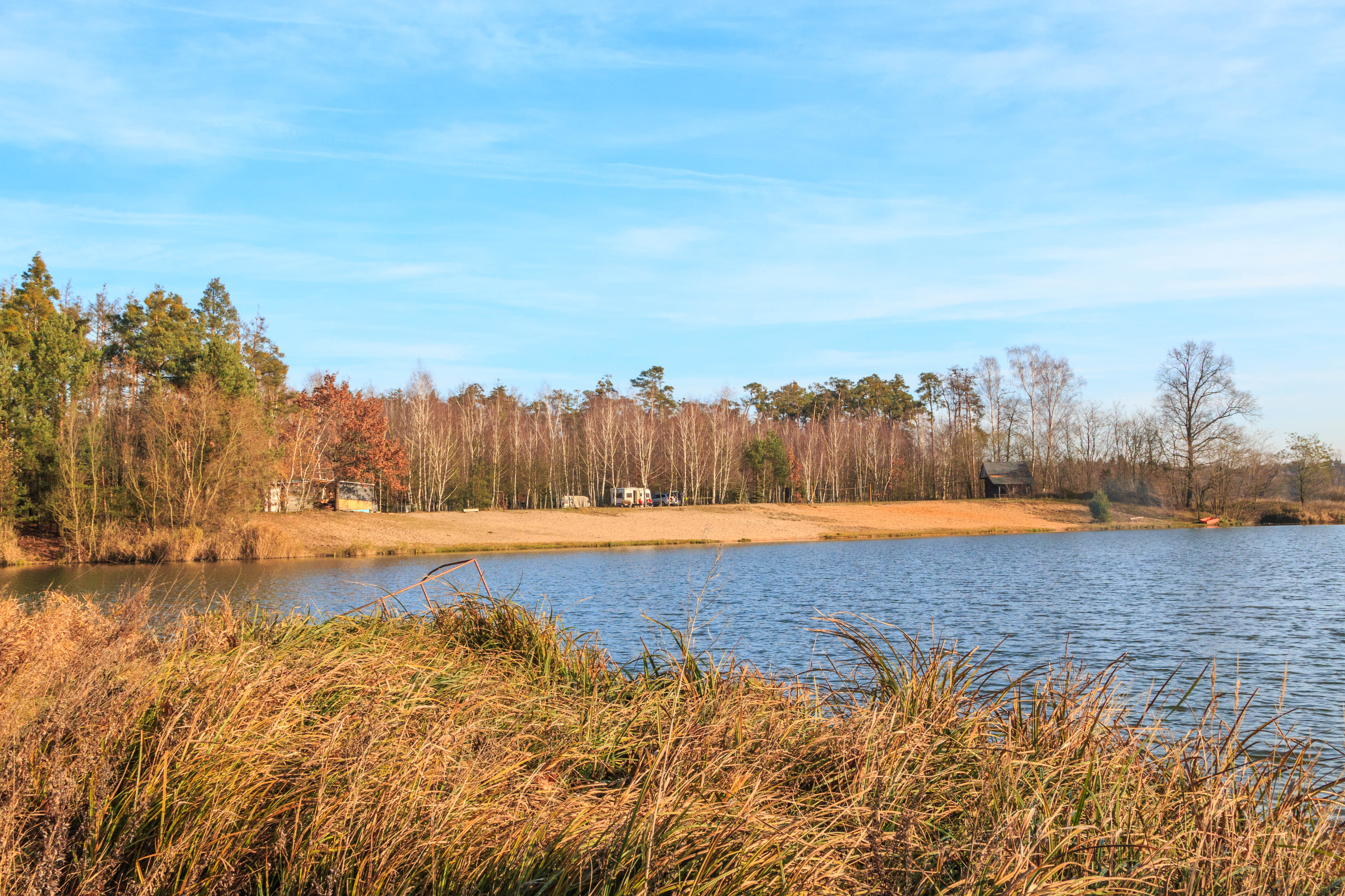 rybník Tomášek u Semína Project: Vodstvo.